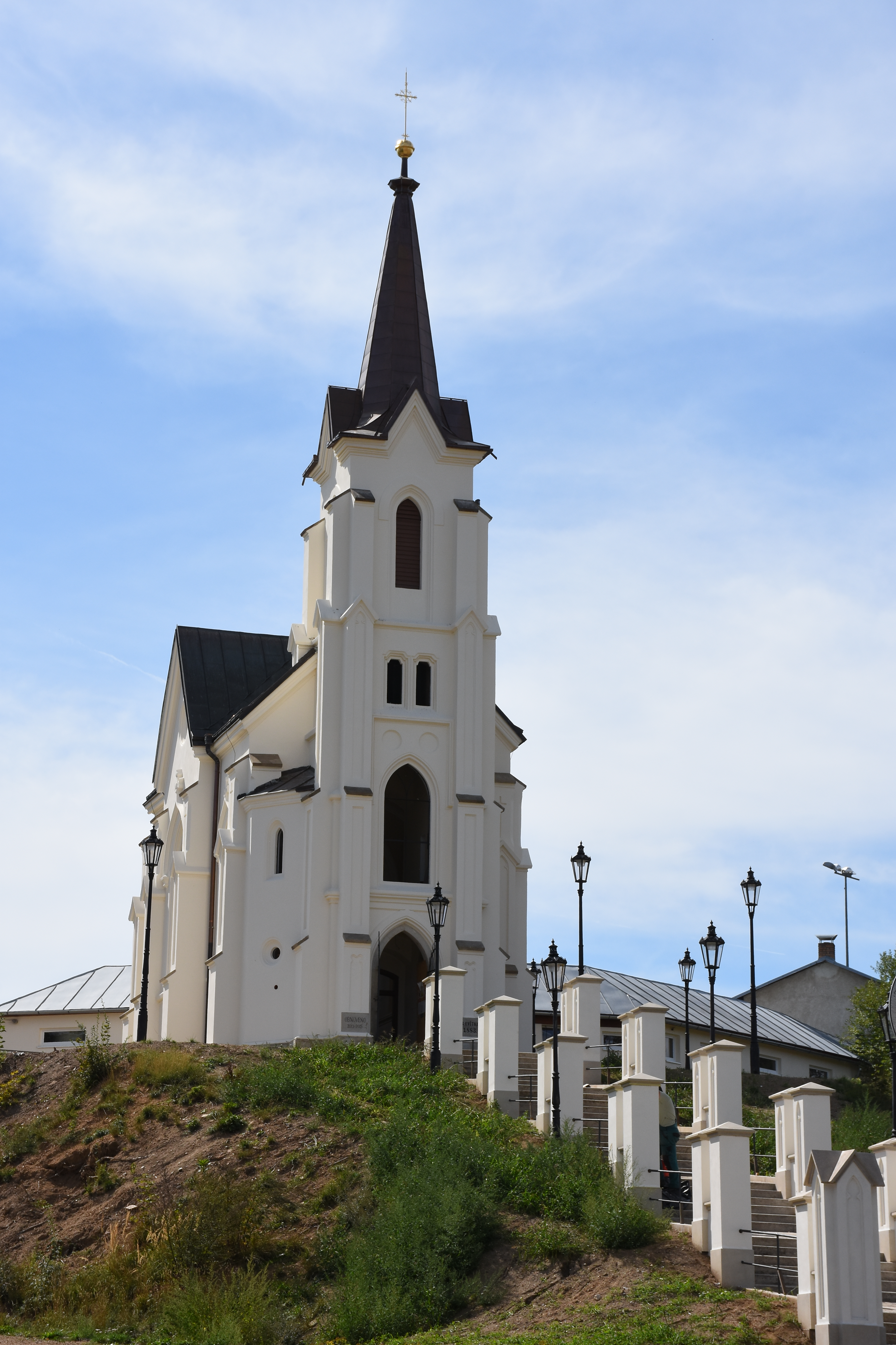 Kaple sv. Kříže. V roce 2012 objekt získalo do svého majetku Město Pelhřimov. V letech 2013 - 2015 proběhla celková rekonstrukce objektu včetně vitrážového zasklení, vybavení interiéru mobiliářem, obnovy schodiště a úpravy okolní zeleně. Kaple byla slavnostně otevřena 27. října 2015. Objekt slouží výhradně ke společenským a kulturním účelům – svatební obřady, koncerty, přednášky apod. Dovršením rehabilitace by měl být návrat původního novogotického hlavního oltáře, který byl nedávno objeven v depozitáři místní farnosti. Restaurátorské práce na jeho obnově již byly zahájeny. Po instalaci oltáře na své původní místo bude moct kaple opět případně sloužit i k církevním účelům.Ulice Třída legií. Pelhřimov. Kraj Vysočina. Czech Republic.